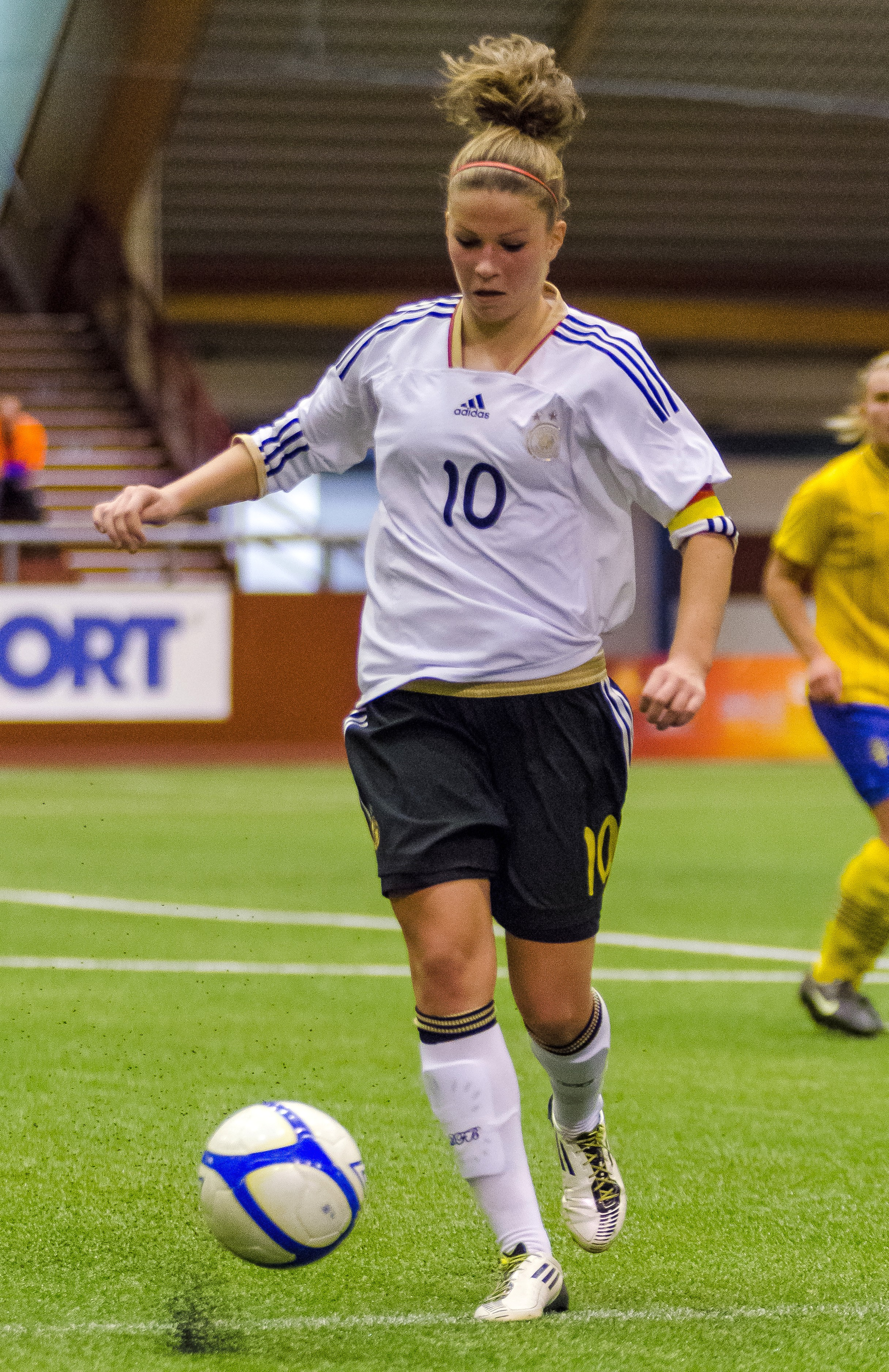 Melanie Leupolz spelar F18-landskamp mellan Sverige och Tyskland i Växjö Tipshall, 21/11 2012.